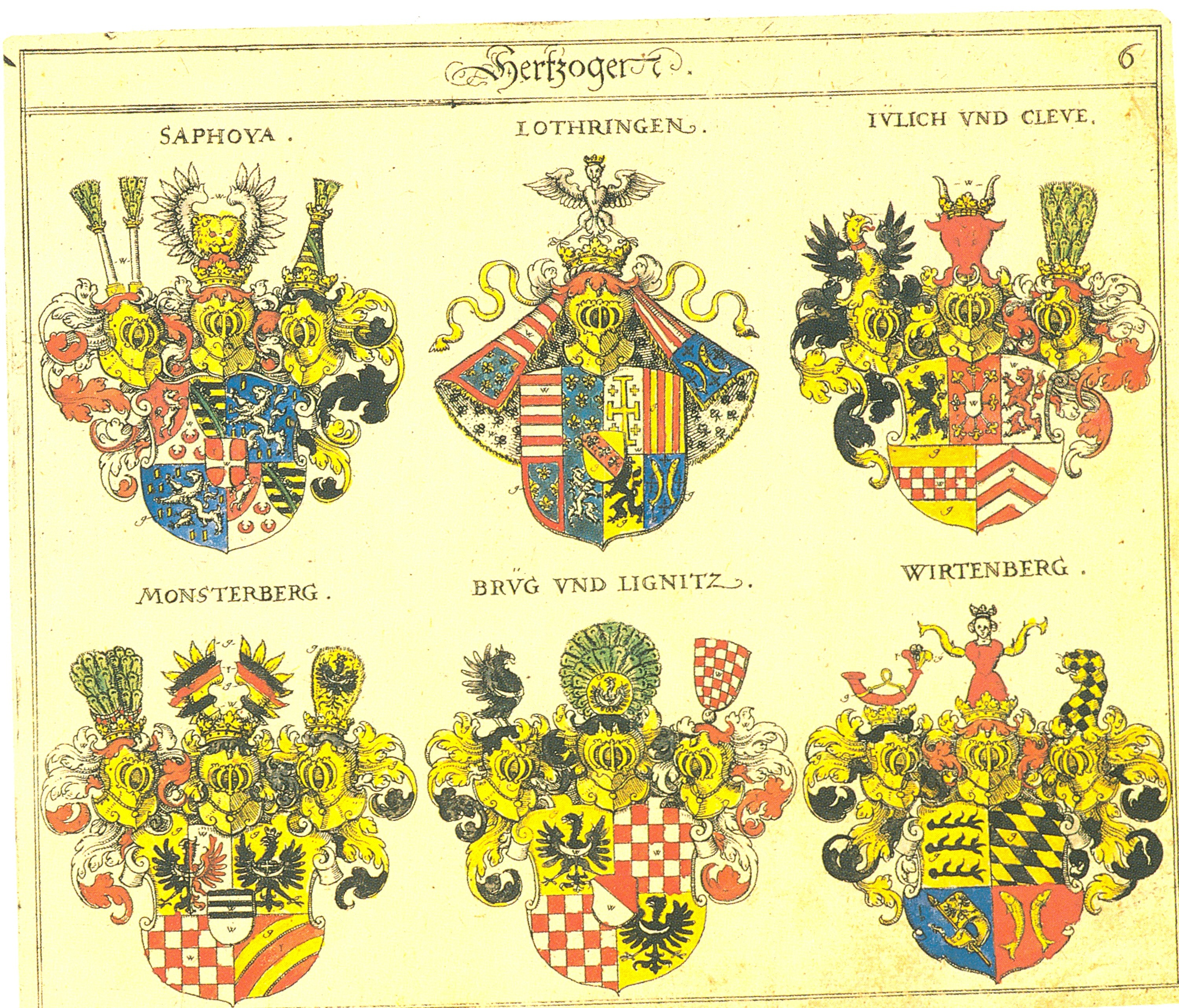 Johann Siebmacher: New Wappenbuch Herzöge Blatt 6